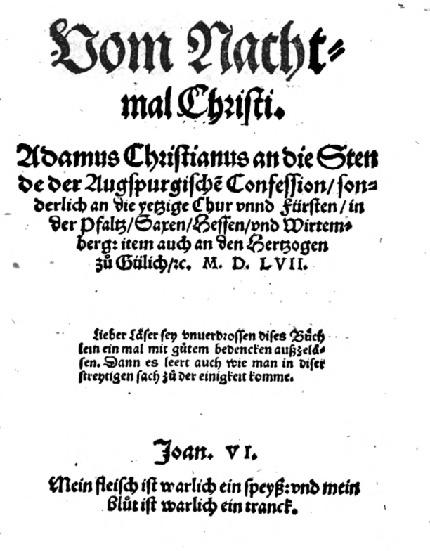 Titelblad "Vom Nachtmal Christi door Adamus Christianus, pseudoniem van Jan Gerritsz Versteghe